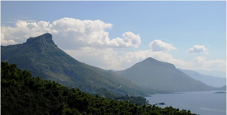 Monti di Maratea.